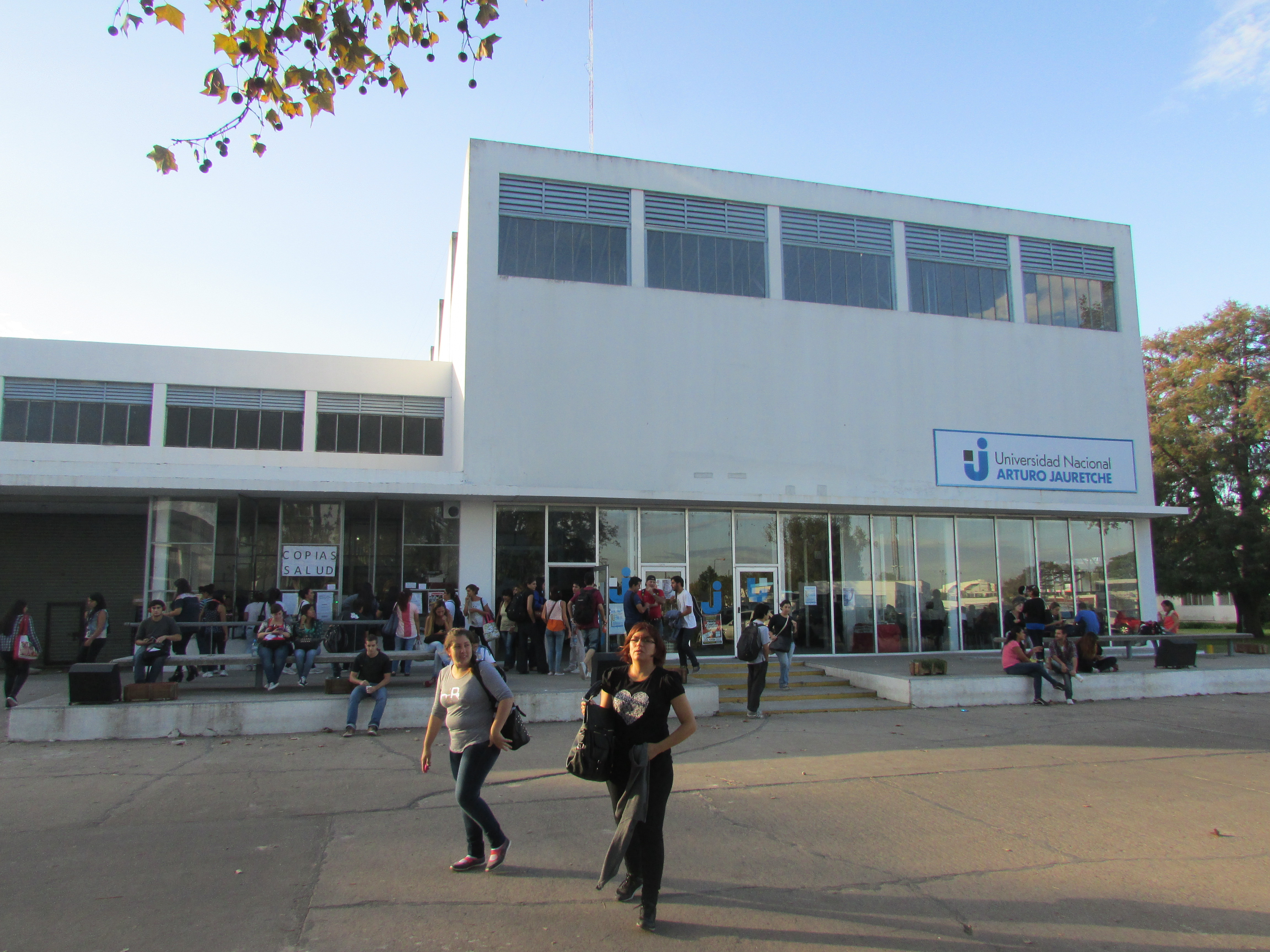 Frente del Sector Savio